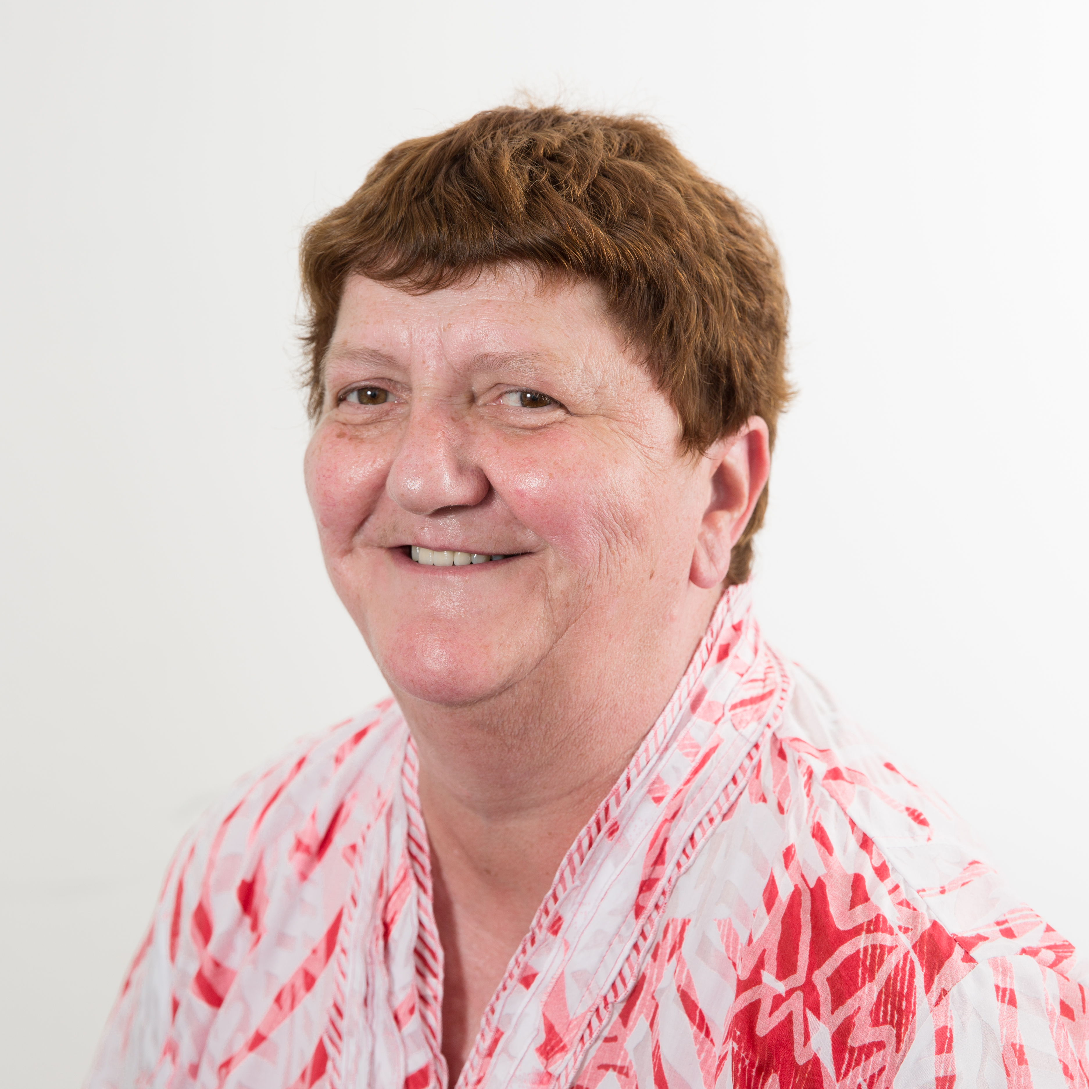 Die saarländische Landtagsabgeordnete Elke Eder-Hippler